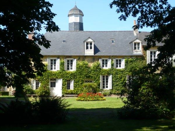 château ou manoir de la Hunaudière, commune de La Chapelle Blanche, pays de Caulnes, département Côtes-d'Armor, région Bretagne, France. Domaine du XIVe siècle, constructions XVIe-XIXe siècles